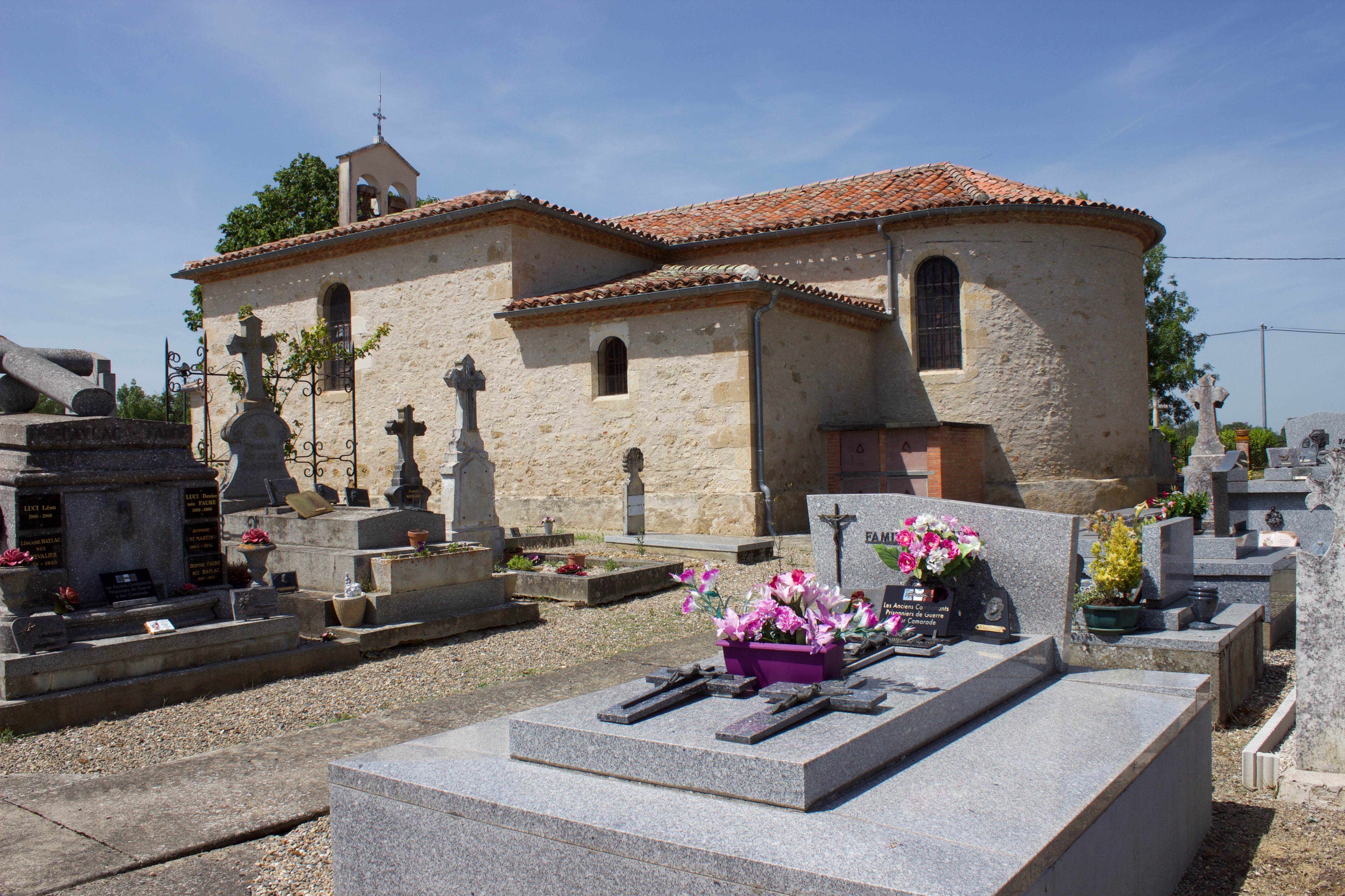 Saint-Antonin (Gers)